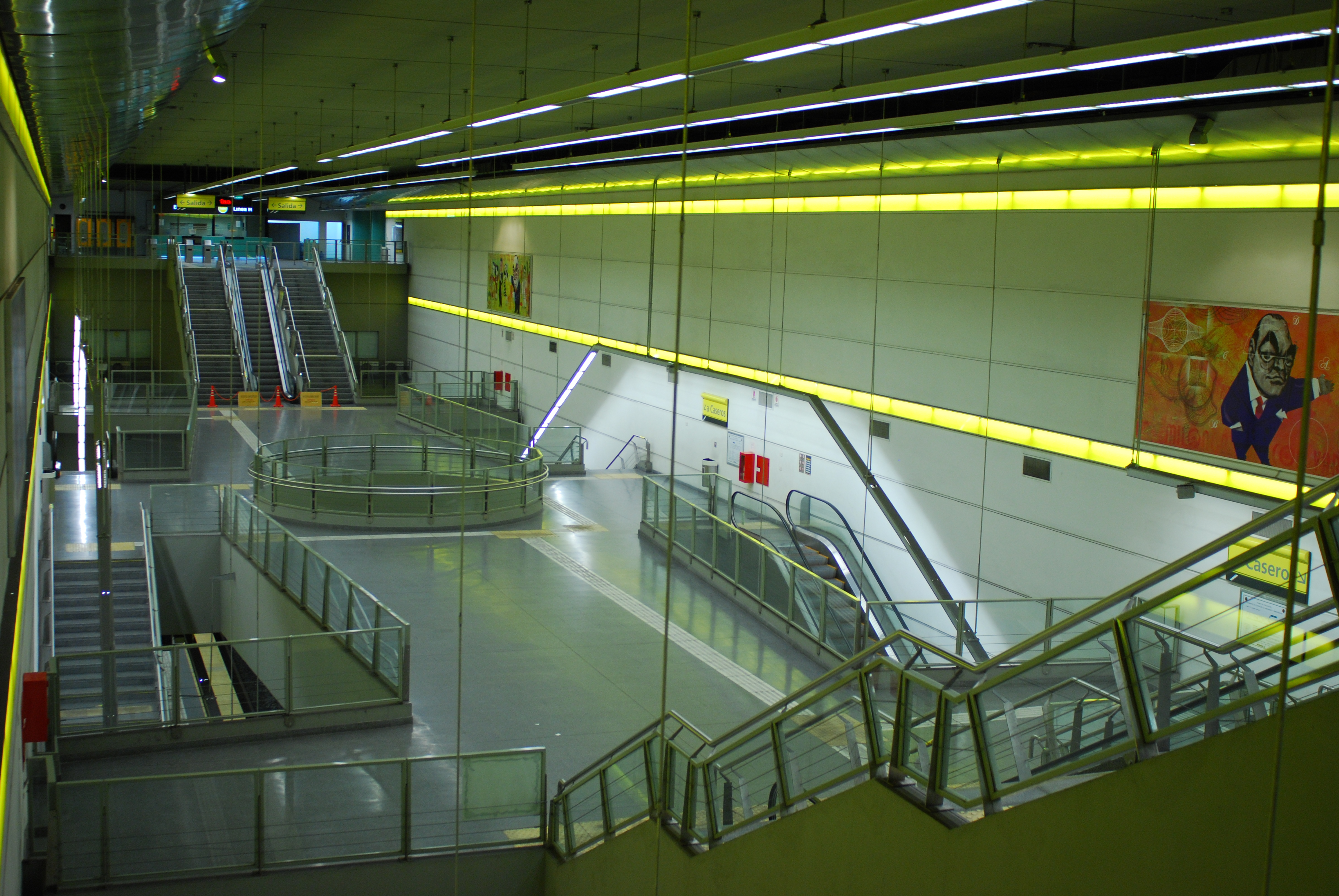 Línea H de subtes en Buenos Aires, entrepiso de la estación Humberto 1º (Argentina, noviembre 2008)